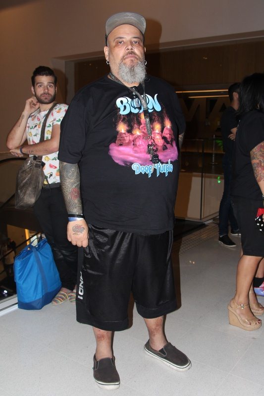 Joao Gordo-001